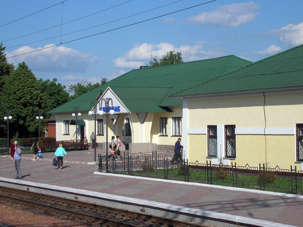 Вокзал станції Коломак